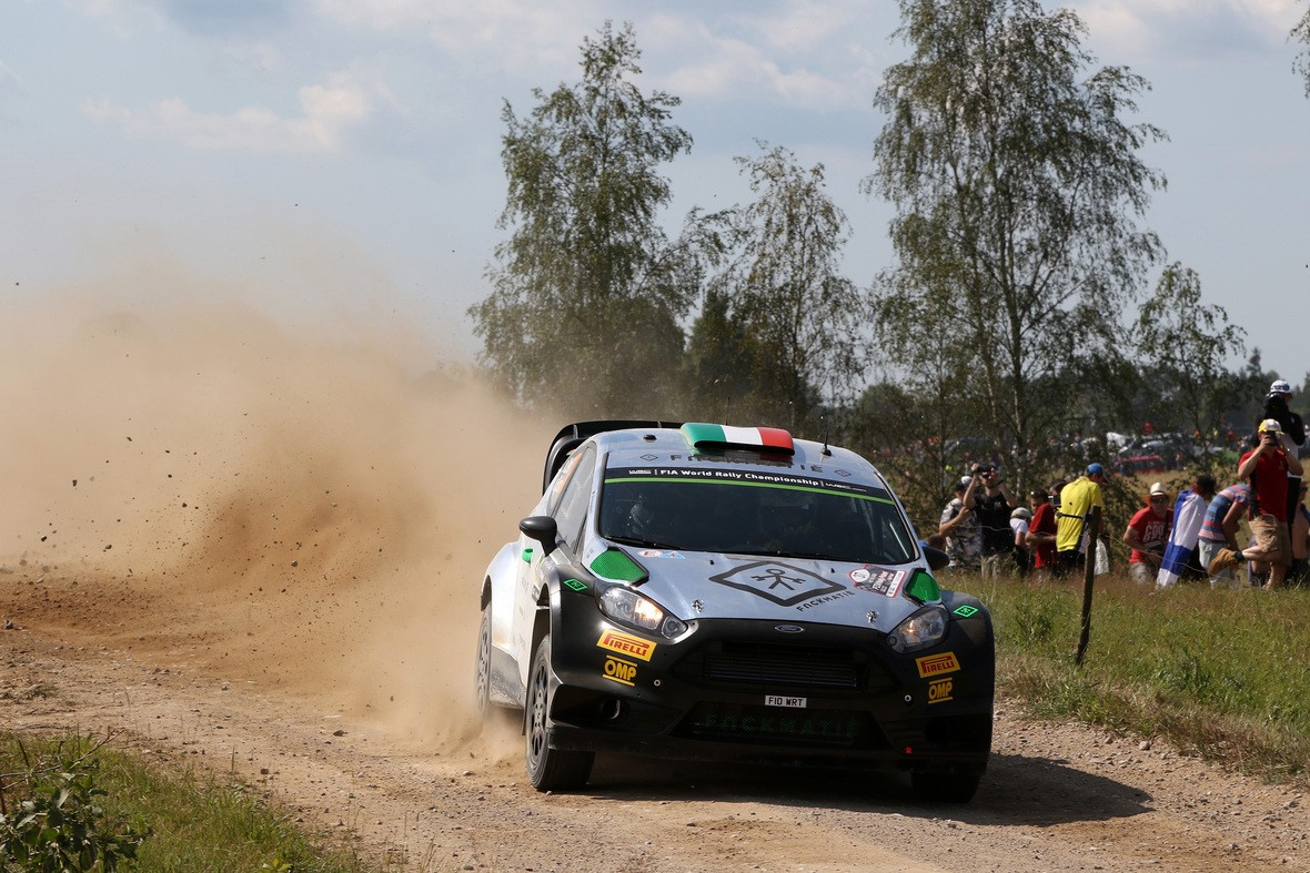 Lorenzo Bertelli podczas Rajdu Polski 2016